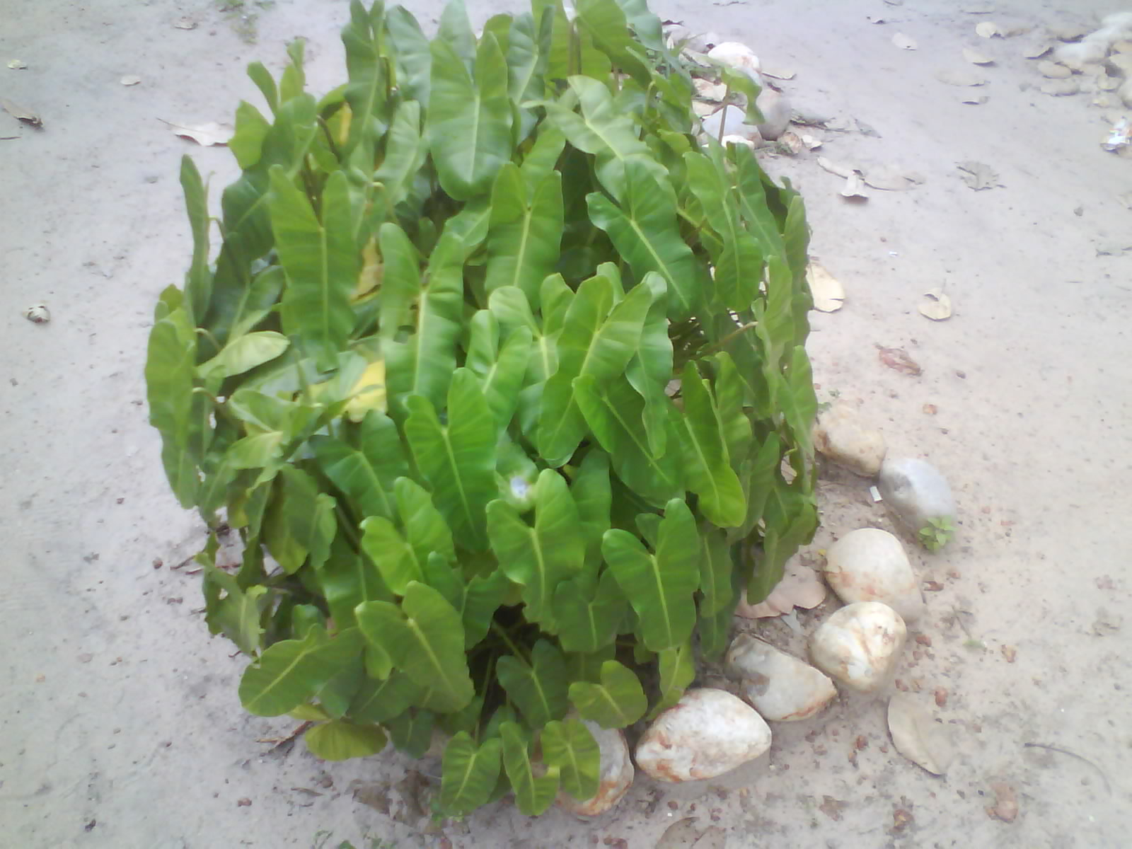 Imbé usada na ornamentação do Campus do Pici, da Universidade Federal do Ceará (UFC)